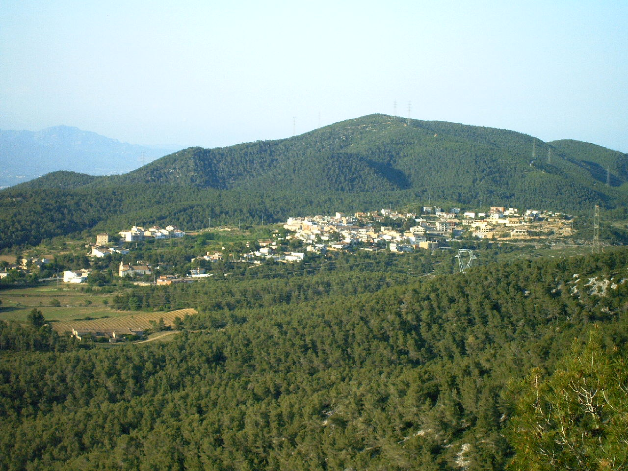 Vista de Ordal, Barcelona